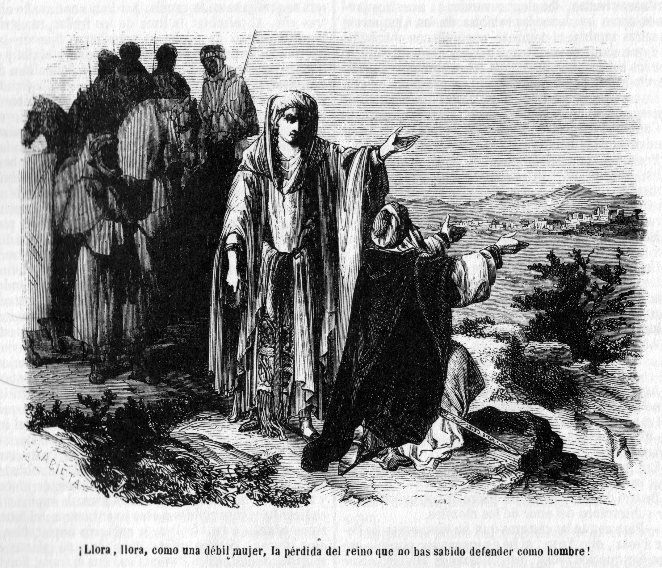 LLora llora, como una débil mujer, la perdida del reino que no has sabido defender como hombre!